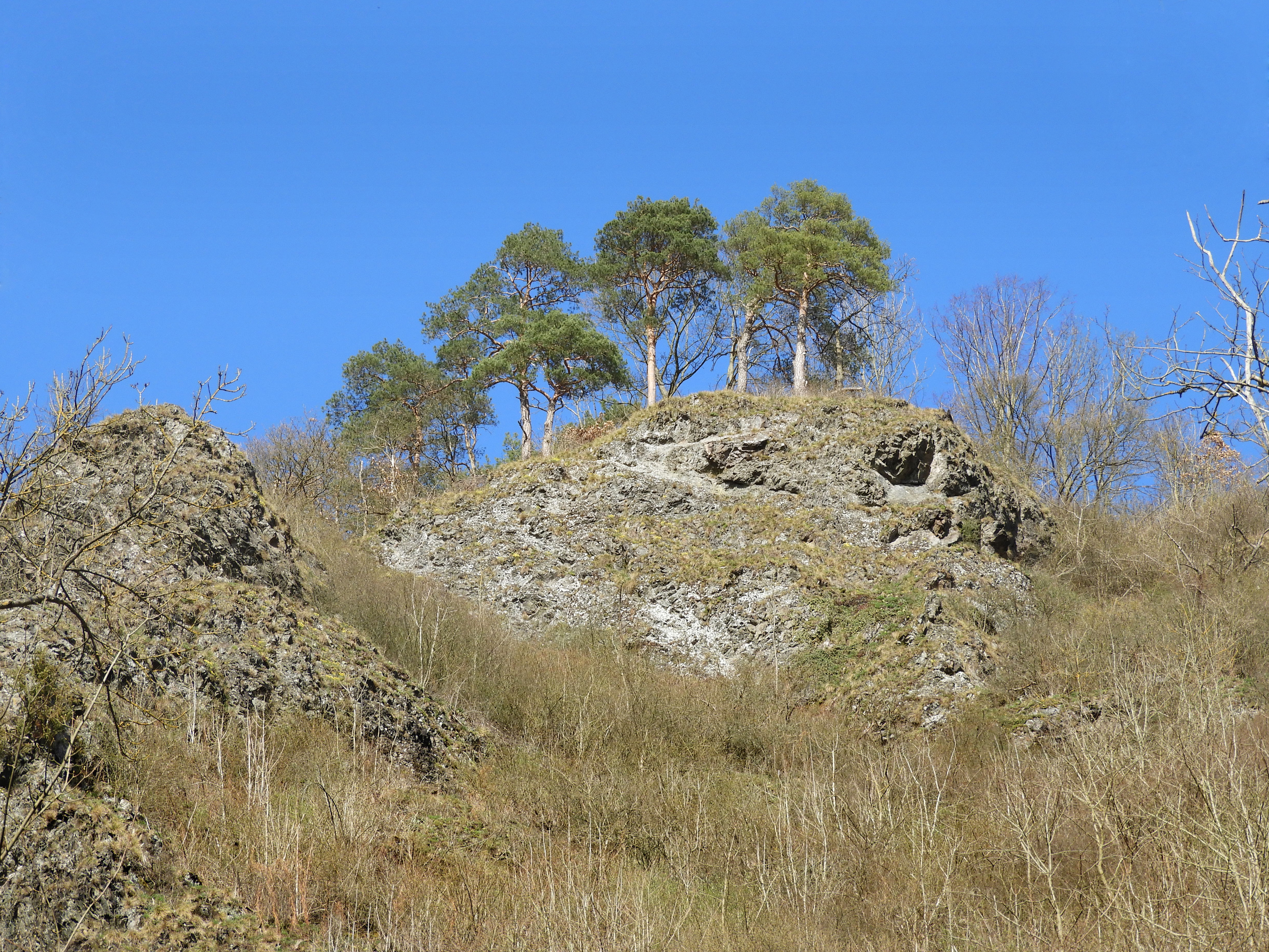 Die schroffen Felsen des Bilsteins liegen im östlichen Meißnervorland im Gemeindegebiet des Eschweger Stadtteils Albungen im Werra-Meißner-Kreis. Vom Tal der Berka steigt der Bilstein von 180 m auf 284,3 m über NN steil an. Das Berkatal zwischen Frankershausen und Albungen, das in diesem Teil "Höllental" genannt wird, ist hier eng und steilwandig. Beidseitig ragen steile Klippen aus hartem Diabasgestein auf. Den ersten Schutzstatus erhielt der Bilstein schon vor über 100 Jahren, in 1914, wegen seiner geologischen und botanischen Besonderheiten. In 1960 folgte die Ausweisung zum Naturschutzgebiet mit einer Fläche von 3,19 Hektar und dem WDPA ID-Code 81402. Mit gleichen Gebietsgrenzen und Erhaltungszielen wurde der Bilstein dann in 2008 als Fauna-Flora-Habitat-Gebiet mit der Nr. 4725-303 Teil des europäischen Schutzgebietsnetzwerkes Natura 2000. Das Gebiet gehört zum Geo-Naturpark Frau-Holle-Land.